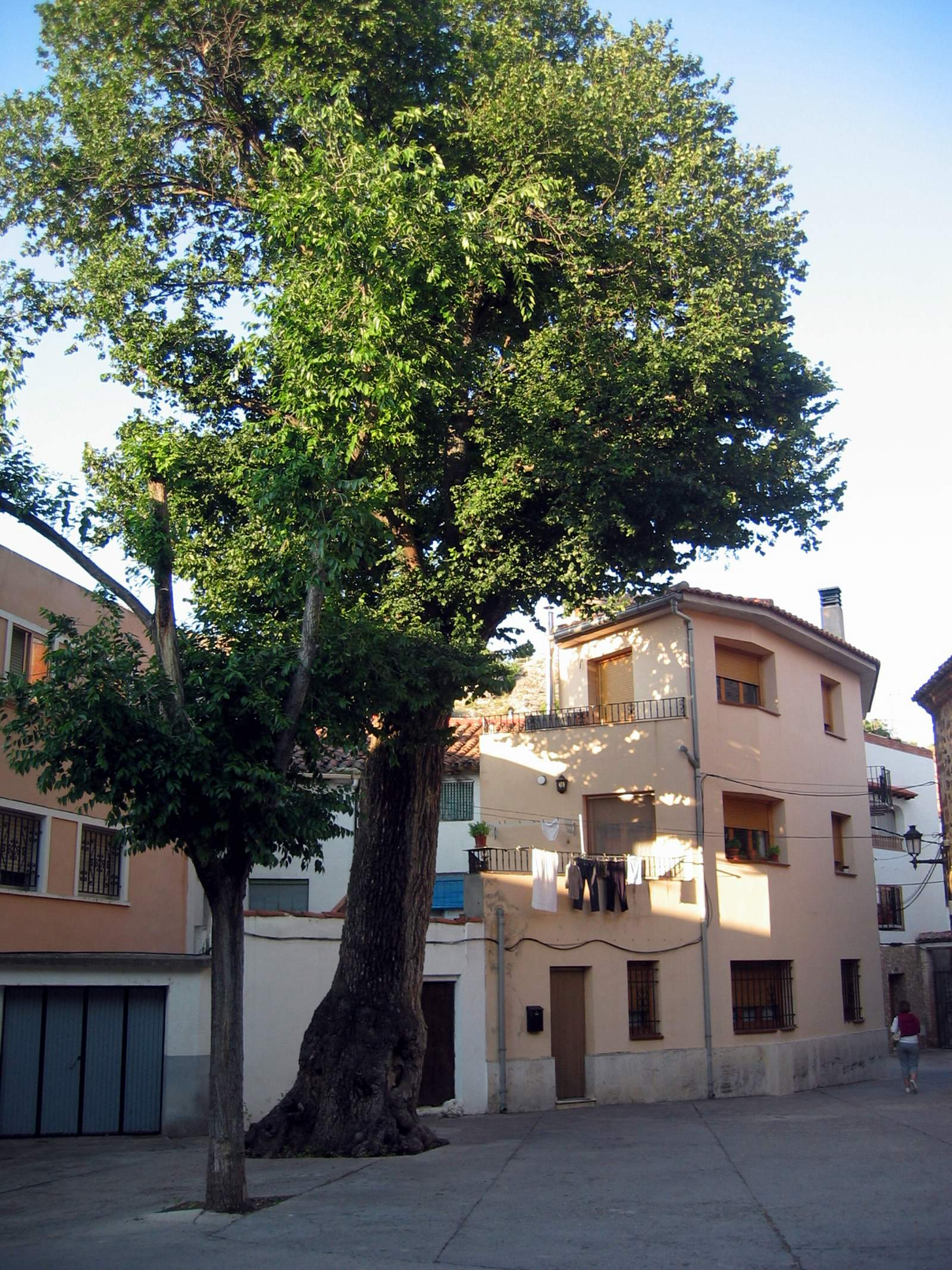 Vista del olmo de la Plazuela del Horno en El Cuervo (Teruel).